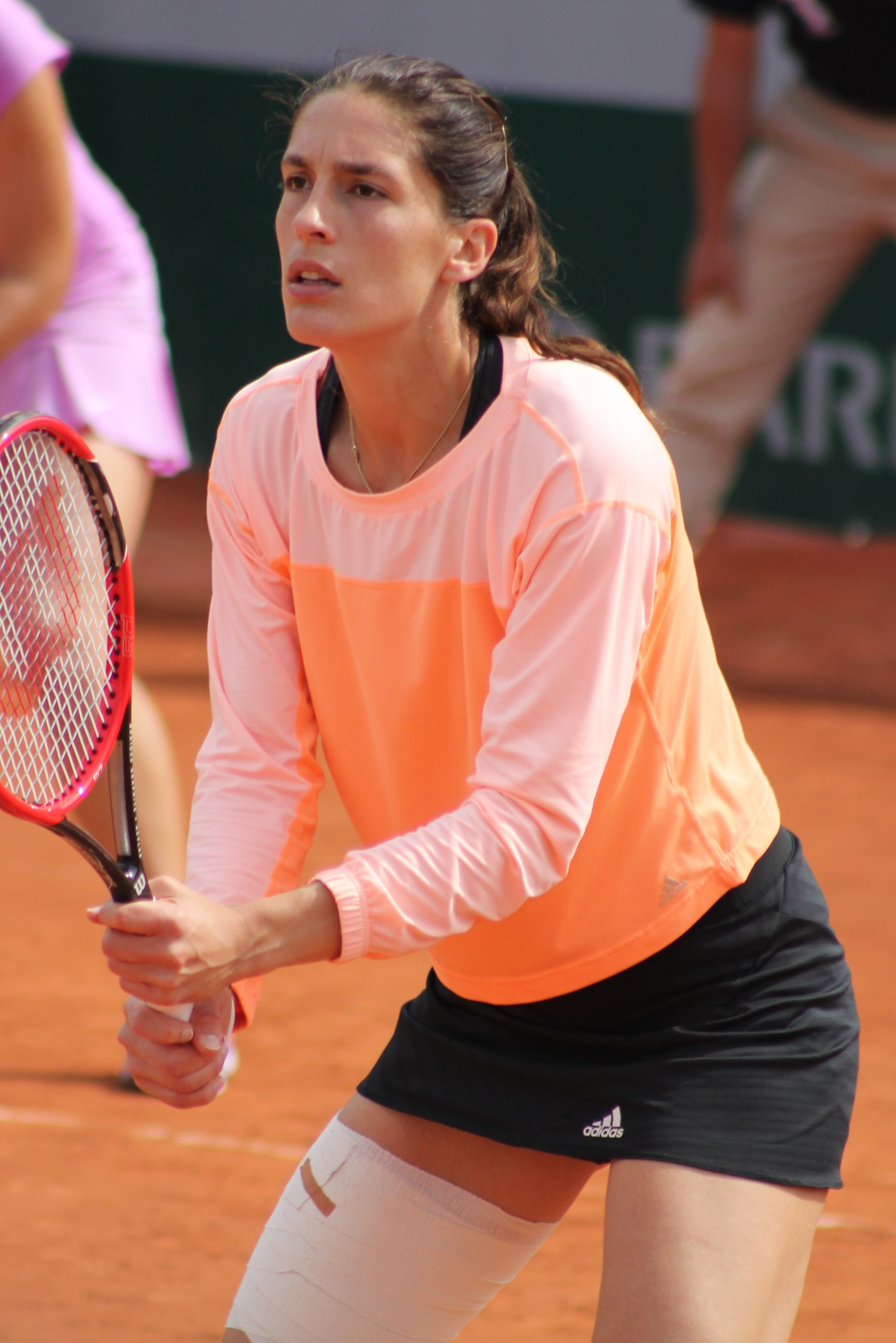 Petkovic RG15 (1)